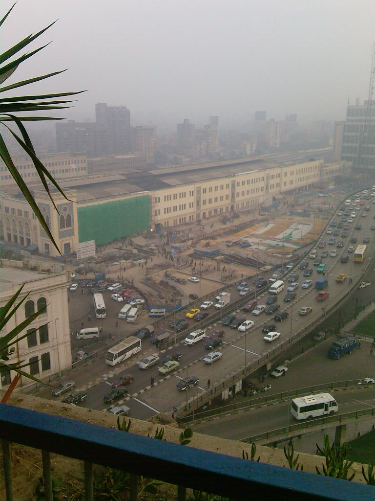 Ramses-Platz vor dem gleichnamigen Bahnhof in Kairo, fotografiert von Terrasse des Hotels Everest im Ramses-Gebäude